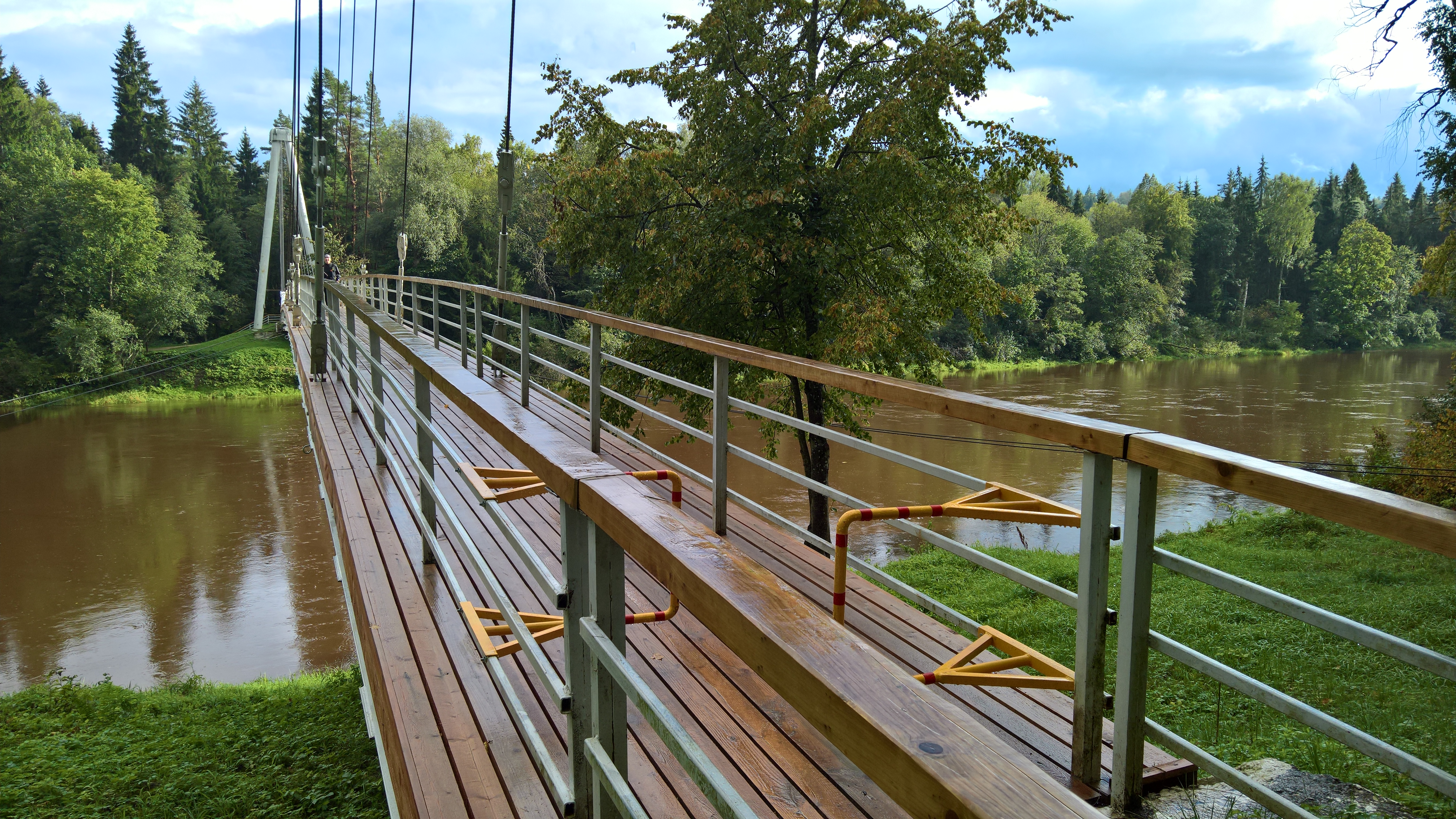 Skats uz tiltu no Gaujas labā krasta